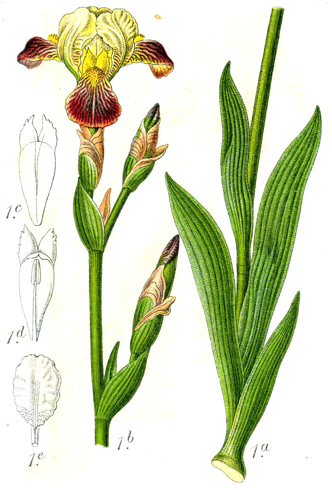 Iris × germanica L. (1753), syn. Iris × squalens L. (1759) Formula hybridae: Iris pallida Lam. × I. variegata L. Original Caption Braunliche Schwertlilie, Iris squalens